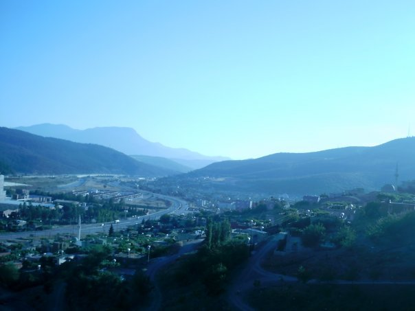 Bahçe, Osmaniye'den bir görünüm.